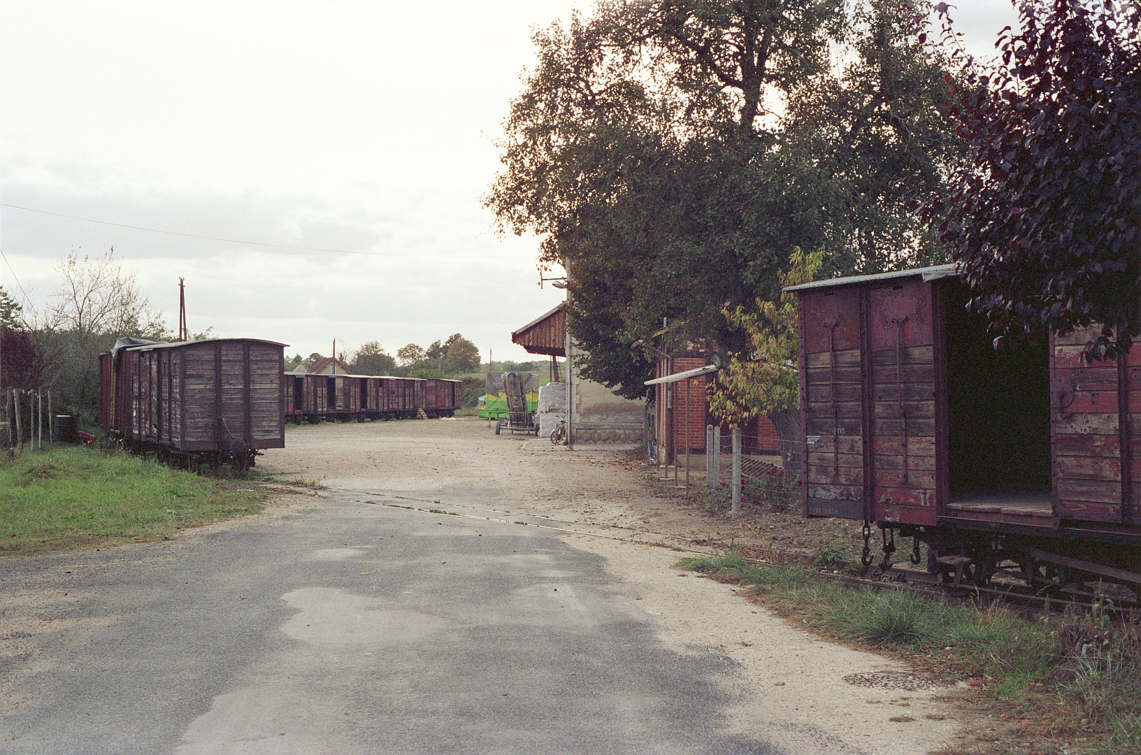 Wagons couverts garés sur la voie de débord de la gare de Luçay-le-Mâle le 14 octobre 1989.